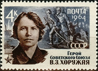 Почтовая марка СССР - Хоружая Вера Захаровна, Герой Советского Союза